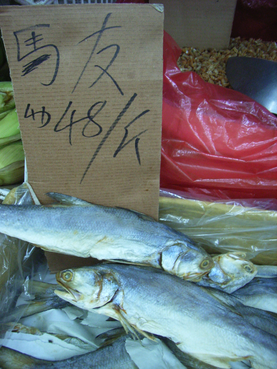 鹹魚 是以鹽醃漬後，曬乾的魚。